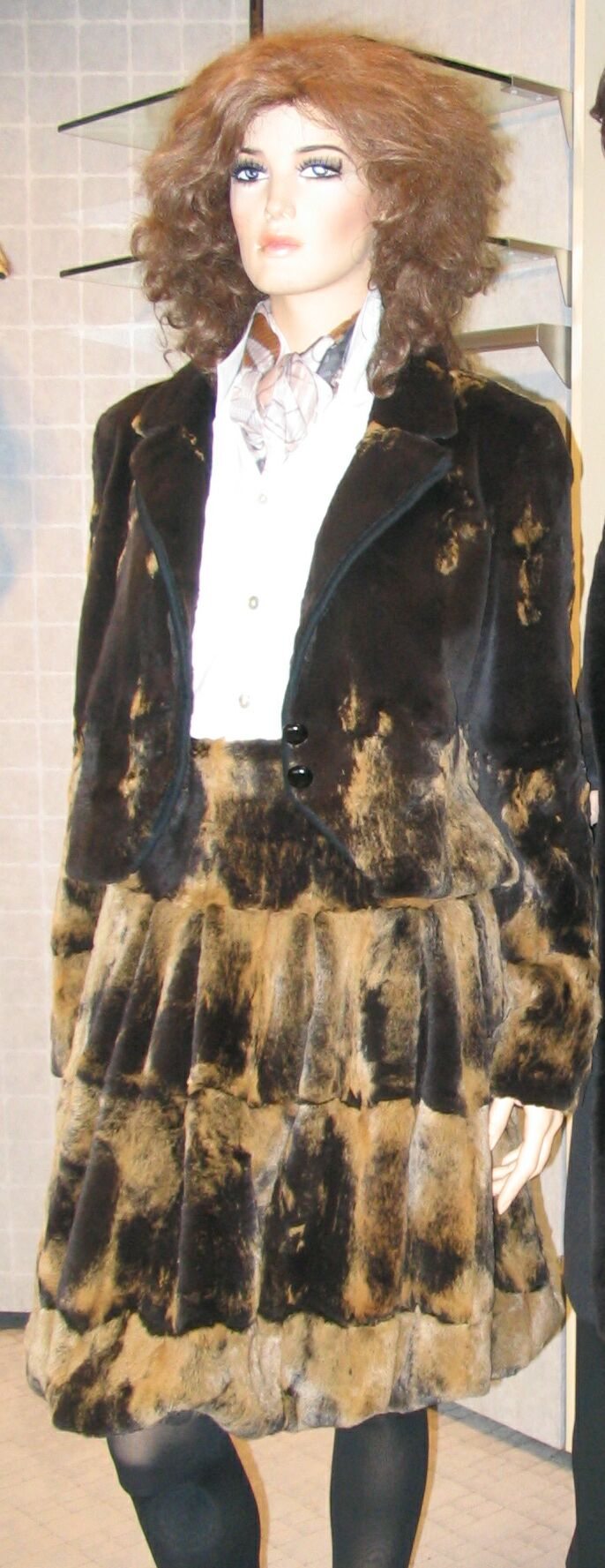 Two-piece suit of Russian grey sqirrel, dyed and shorn / Russisch Feh-Kostüm (gefärbt und geschoren). Germany, September 2007. Die gefärbten Fehrückentafeln wurden vor der Weiterverarbeitung ungleich hoch geschoren, jede Tafel verlaufend nach oben tiefer (kurzhaariger), ein ungewöhnlicher Auftrag für den Veredler. Da das dunklere Unterhaar gegenüber dem weggescorenen hellen Grannenhaar dadurch oben stärker zur Geltung kam, wurden die Tafeln und später die daraus gearbeiteten Pelze verlaufend nach oben immer dunkler. Furrier: Pelzmodelle Kuhn, Düsseldorf